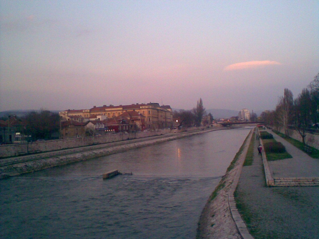 Nišava and Niš